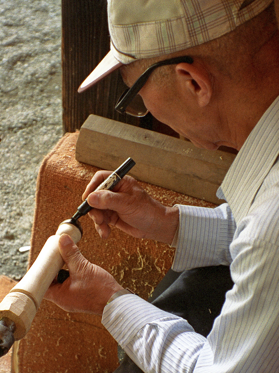 Man finishing a kokeshi in Japan こけし作成